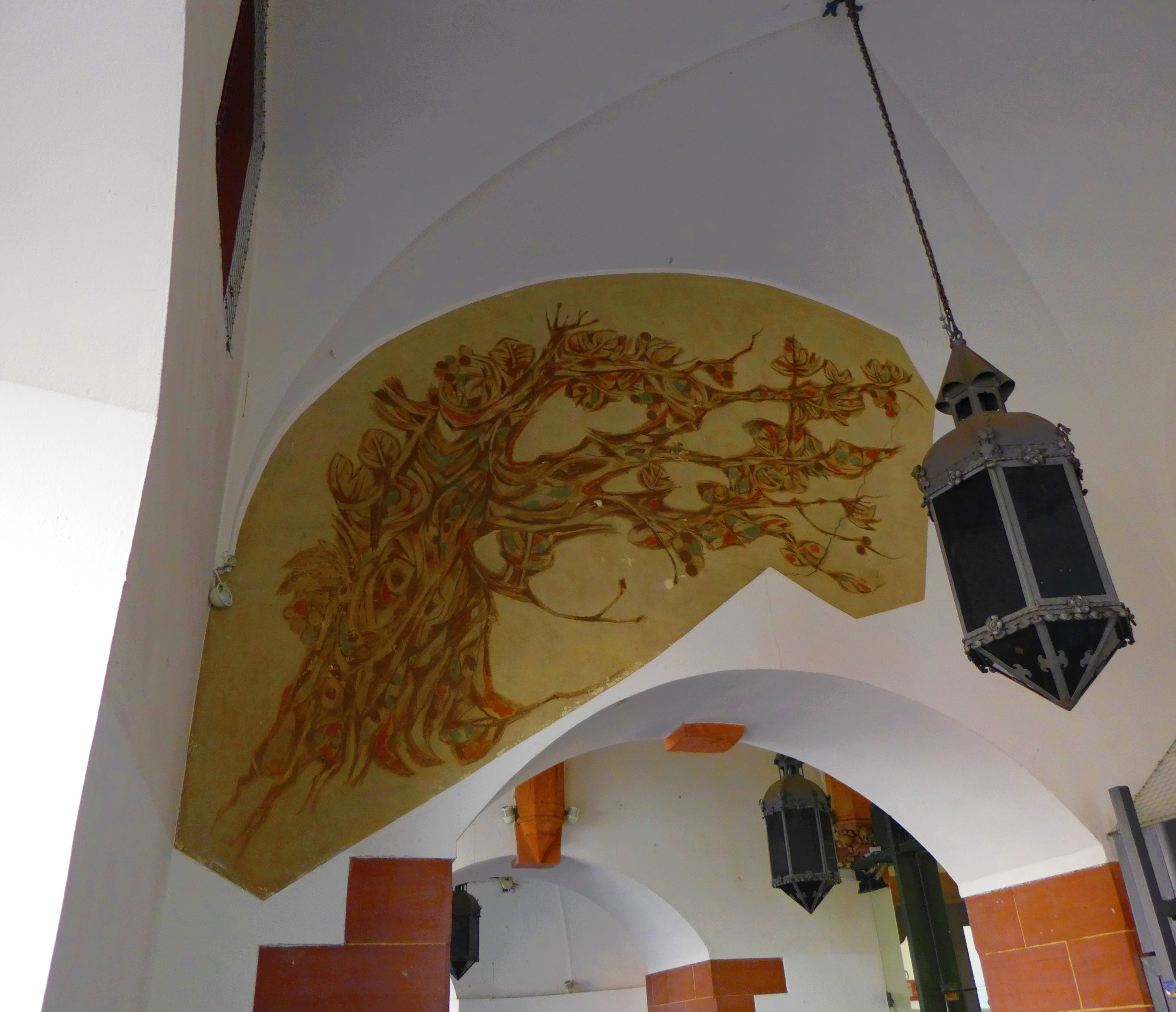 Rathaus St. Johann, Wandgemälde "Weinstock" in der Arkade der Betzenstraße